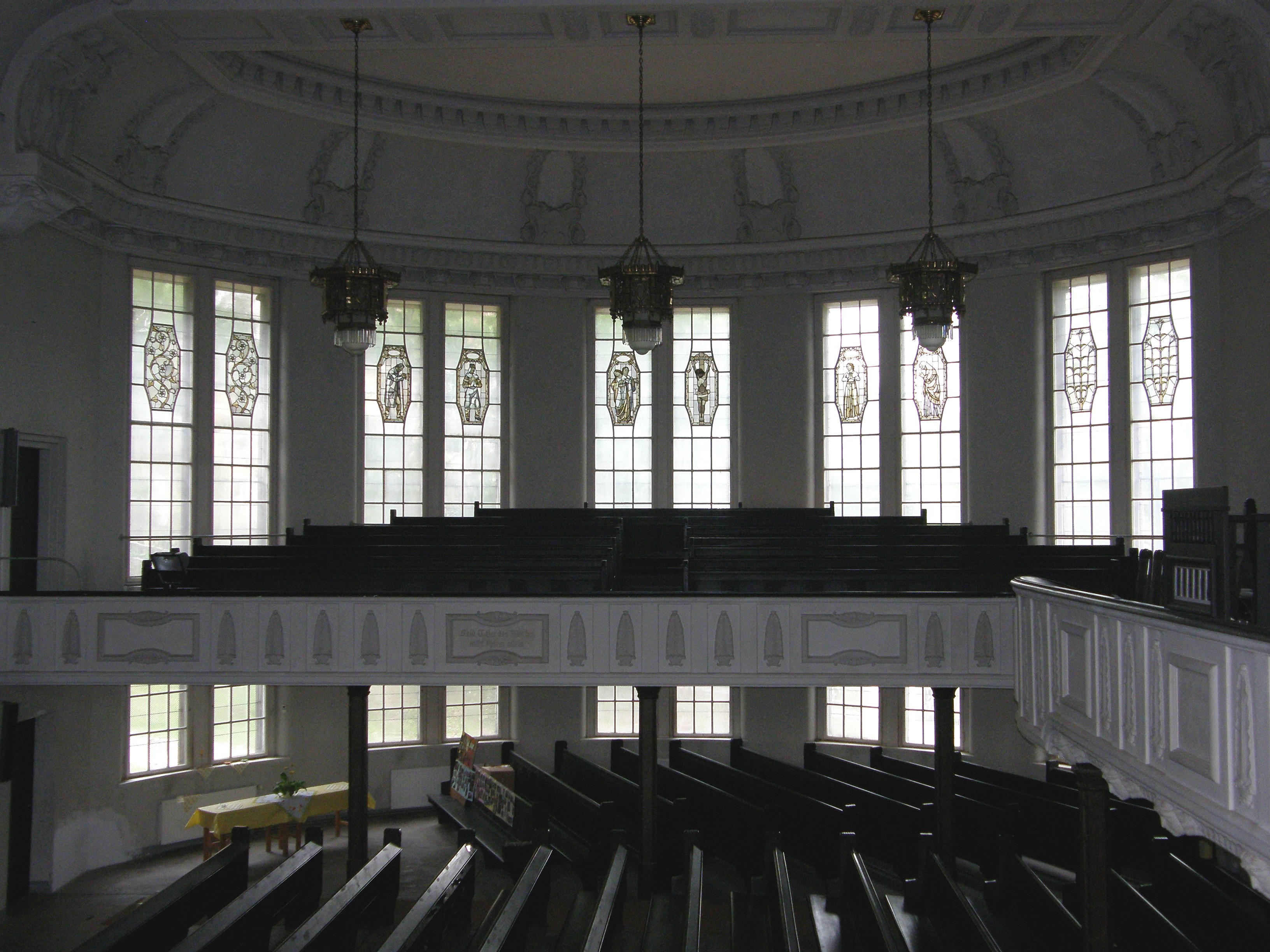 Friedenskirche in Aue-Zelle